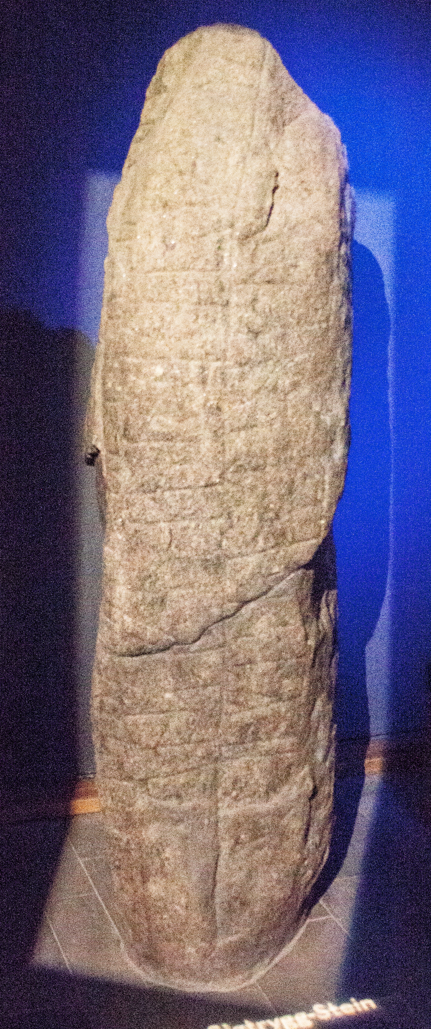 Hedeby, Large Sigtrygg Stonelabel QS:Len,"Hedeby, Large Sigtrygg Stone"label QS:Lhu,"Hedeby, a nagy Sigtrygg kőnek nevezett rúnakő"